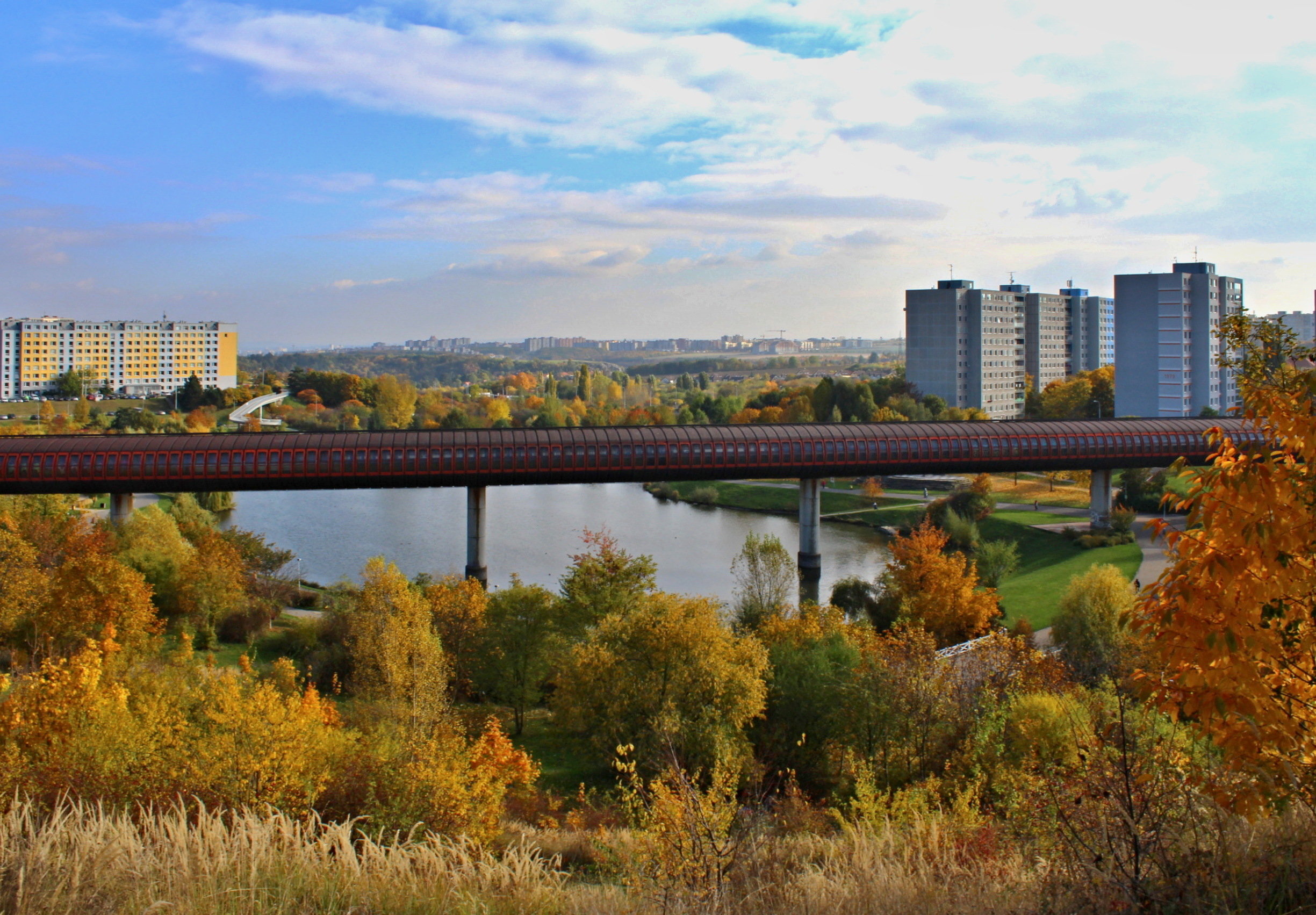 Most metra přes údolí Prokopského potoka